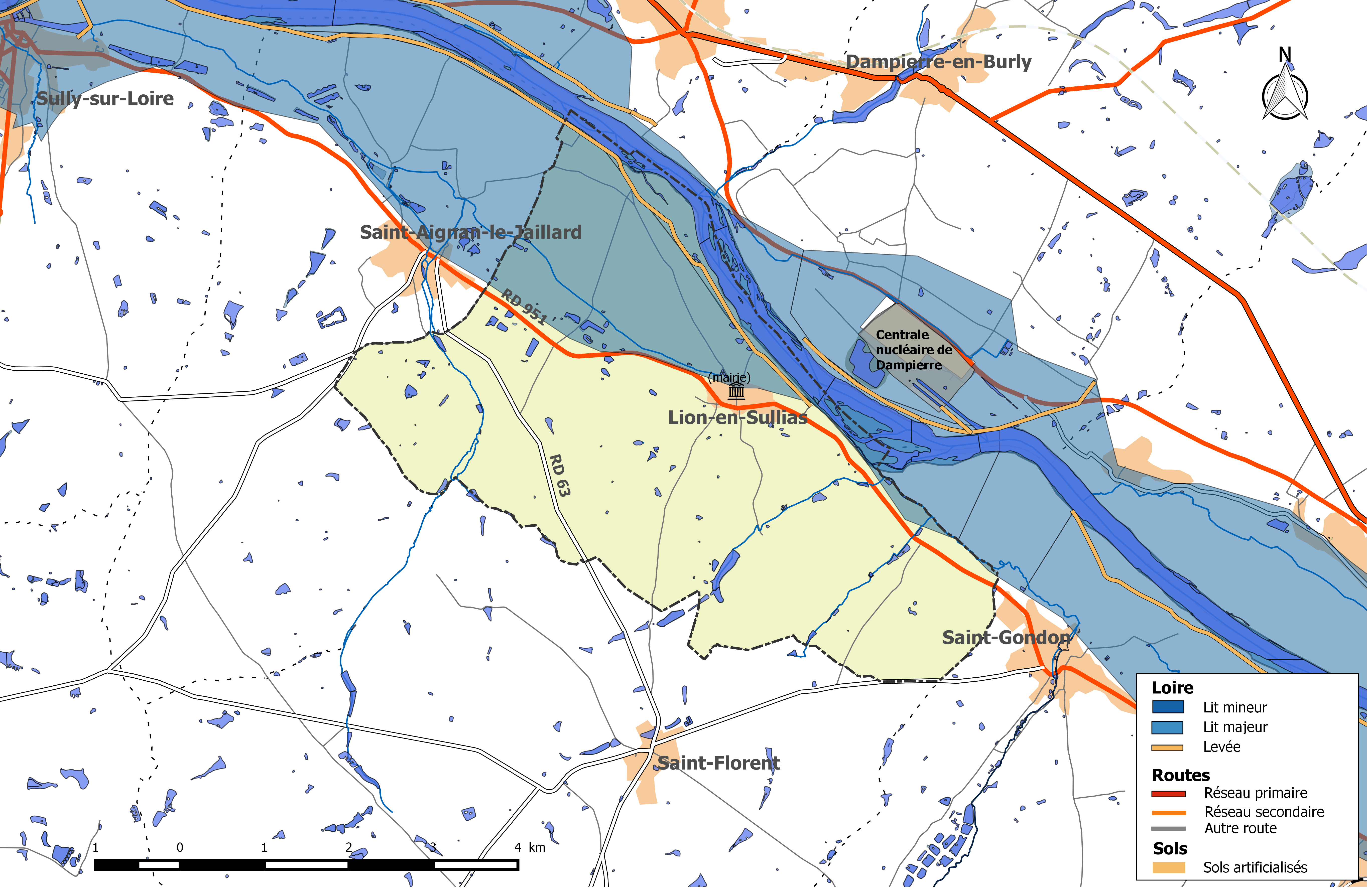 Zone inondable et réseaux hydrographique et routier de la commune de Lion-en-Sullias.